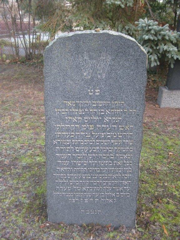 מצבה מבית הקברות